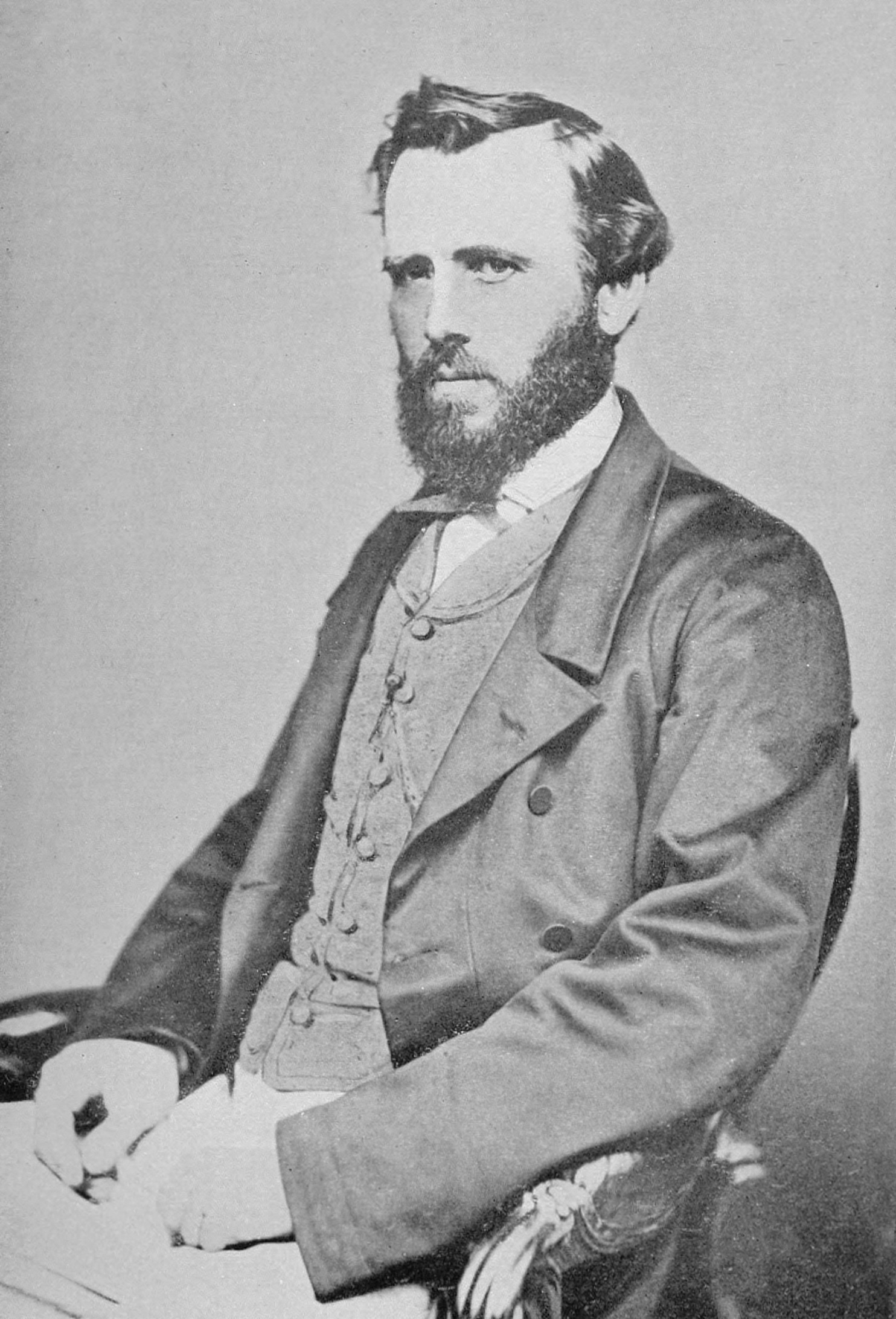 David Syme